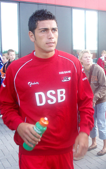 Foto van de voetballer Graziano Pellè op de eerste training van het seizoen 2007/2008 bij AZ Alkmaar.